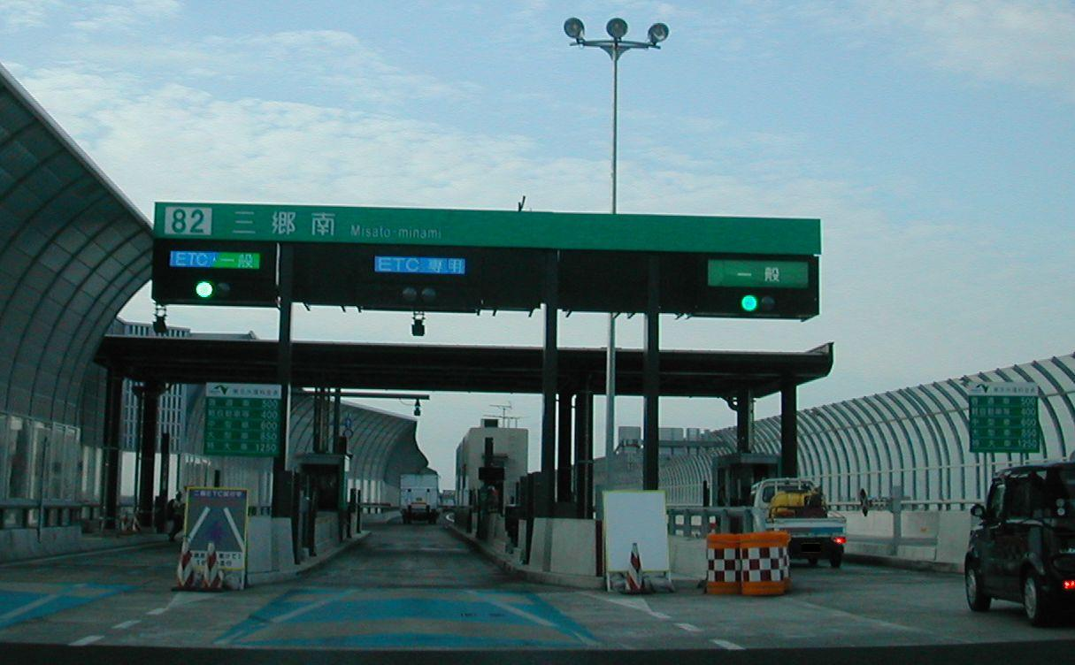 Misato-minamiIC-TB,Misatocity,Chiba,Japan